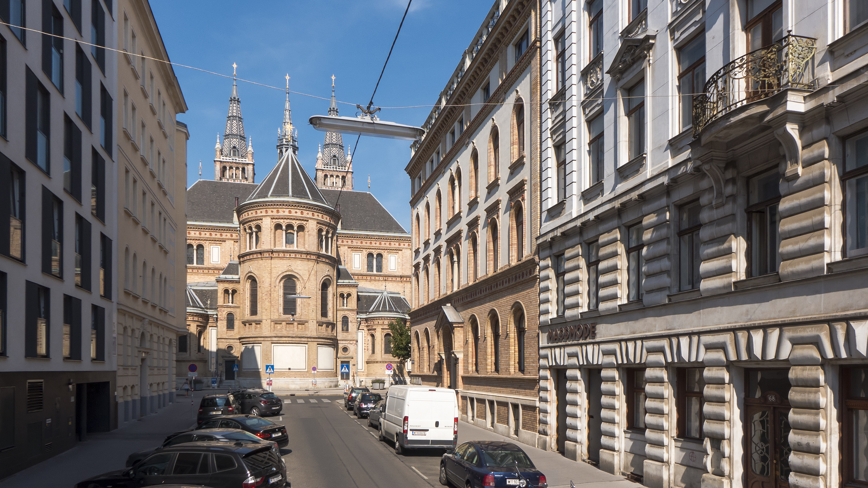 Florianigasse in Wien 8 bei der Blindengasse Richtung Westen